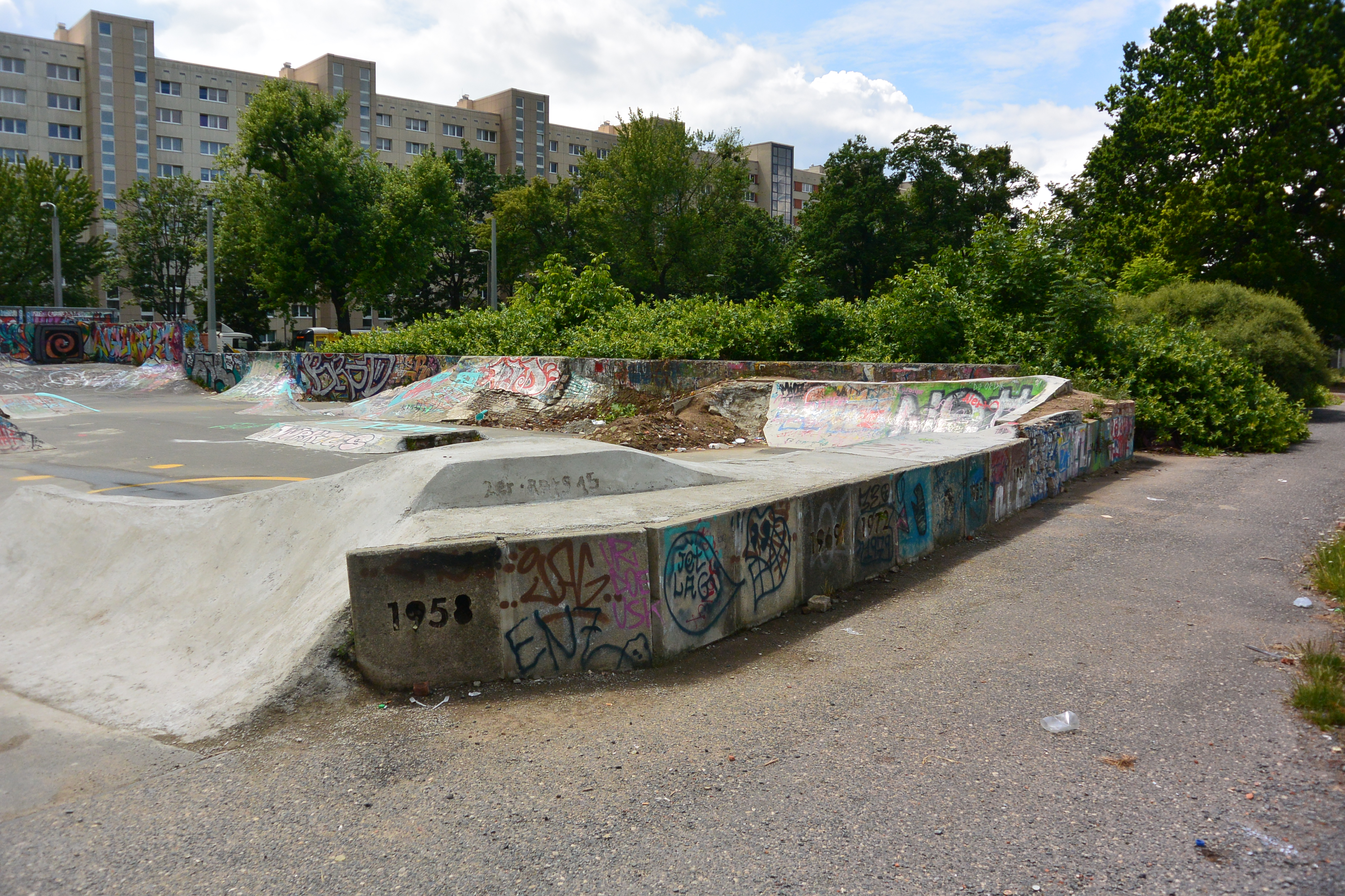 Skatepark Trinitatisplatz in der Dresdner Johannstadt auf dem Gelände des ehemaligen Betonplattenwerks mit einigen Plattenbauten im Hintergrund an der Gerokstraße. Bei der Erweiterung der Anlage wurden die Bodenplatten der Betonzeitschiene integriert.